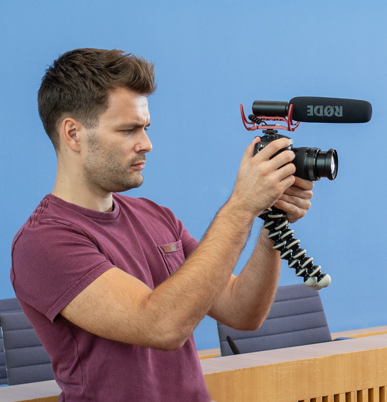 Tilo Jung bei der Bundespressekonferenz mit Peter Altmaier zum Tag der offenen Tür der Bundesregierung am 26. August 2018.